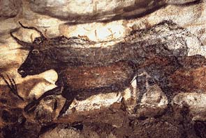 Afbeelding Stier van Lascaux. Grotschildering in Frankrijk Afbeelding is ergens tussen de 12.000 en 17.000 jaar oud. Foto is geen nieuw werk, bij gebrek aan een creatieve daad.